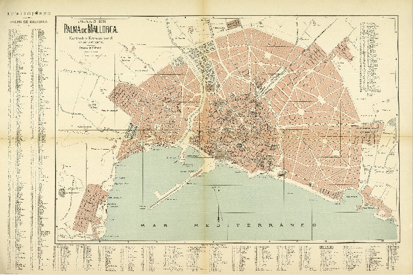 Plano de la ciudad de Palma de Mallorca datado a principios del siglo XX.